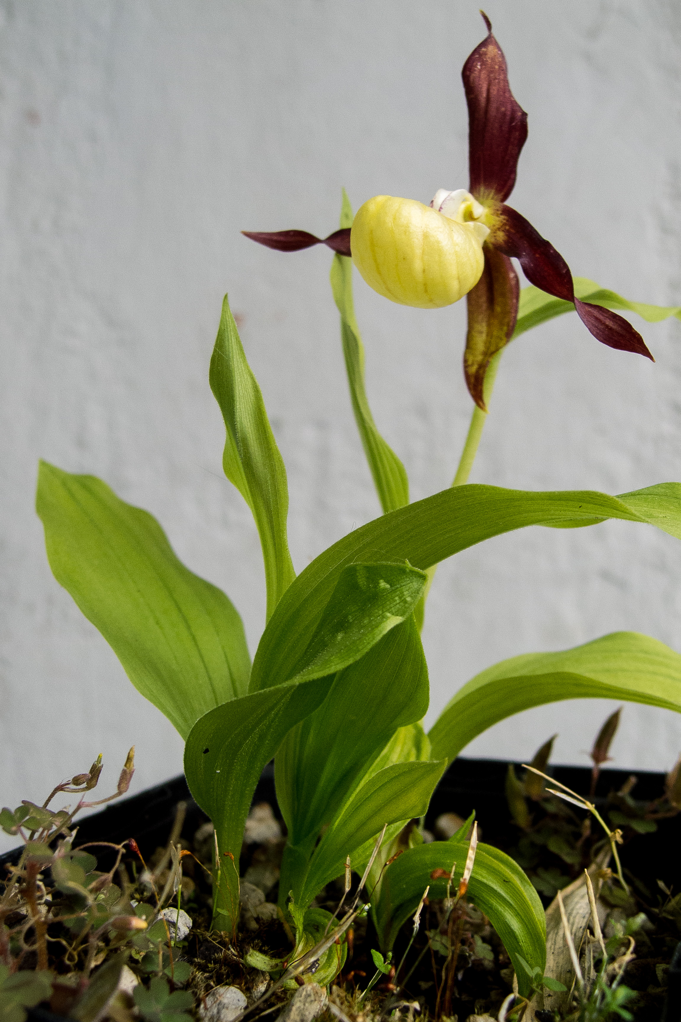 Floraison avril 2014